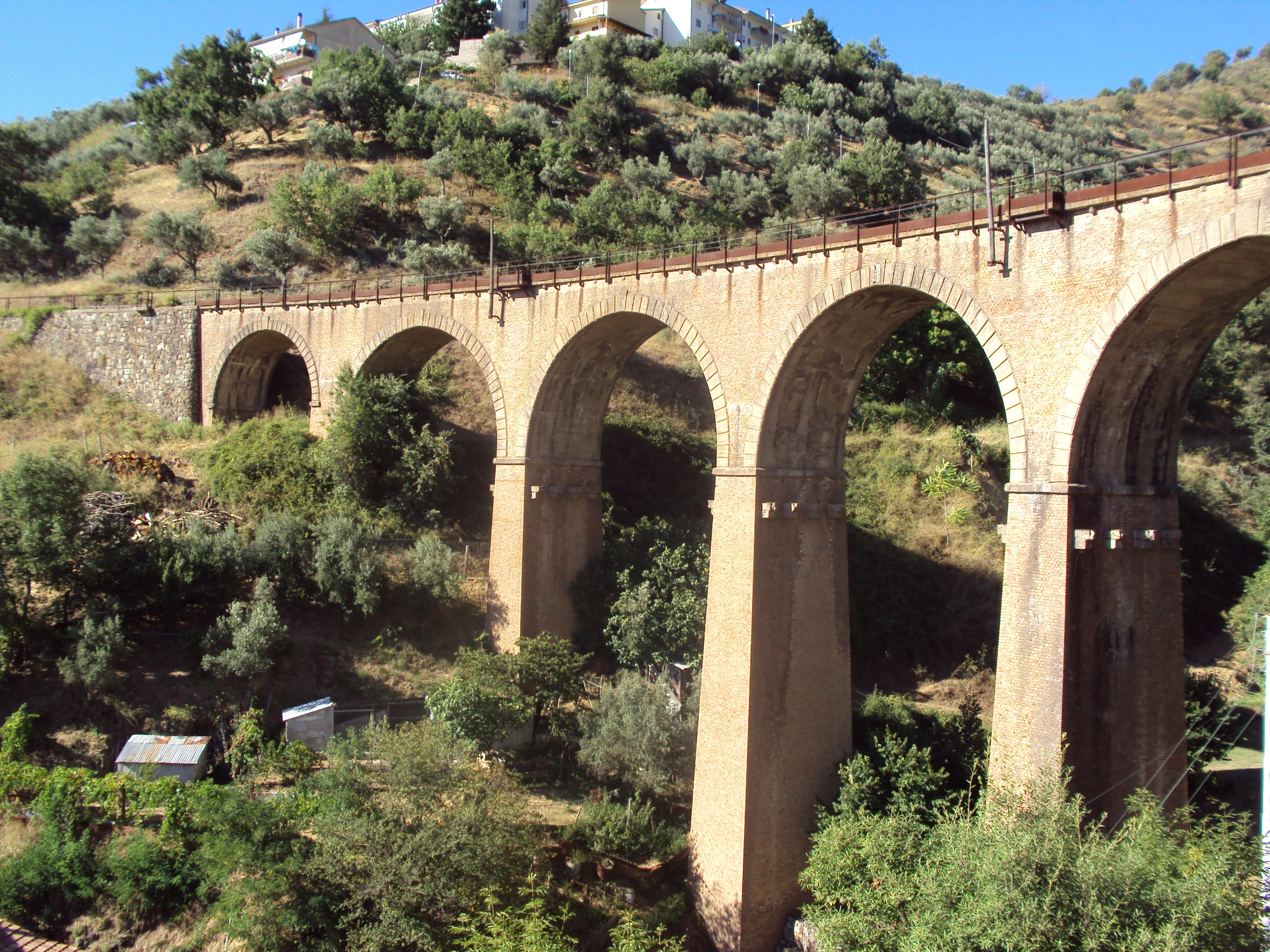 Viadotto ferroviaro a San Pietro in Guarano (CS)